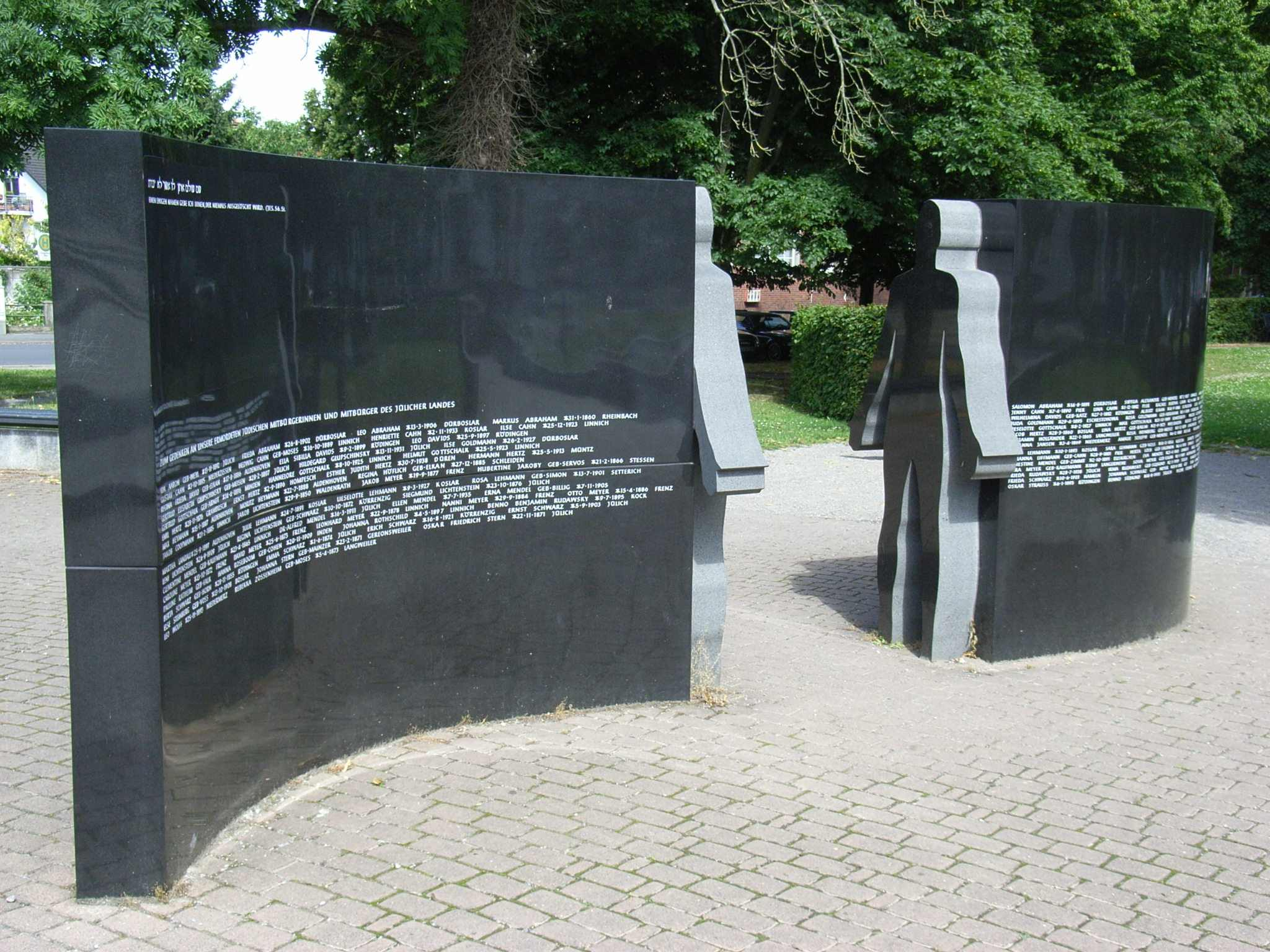 Mahnmal für deportierte jüdische Bürgerinnen und Bürger im Jülicher Land, Jülich, NRW